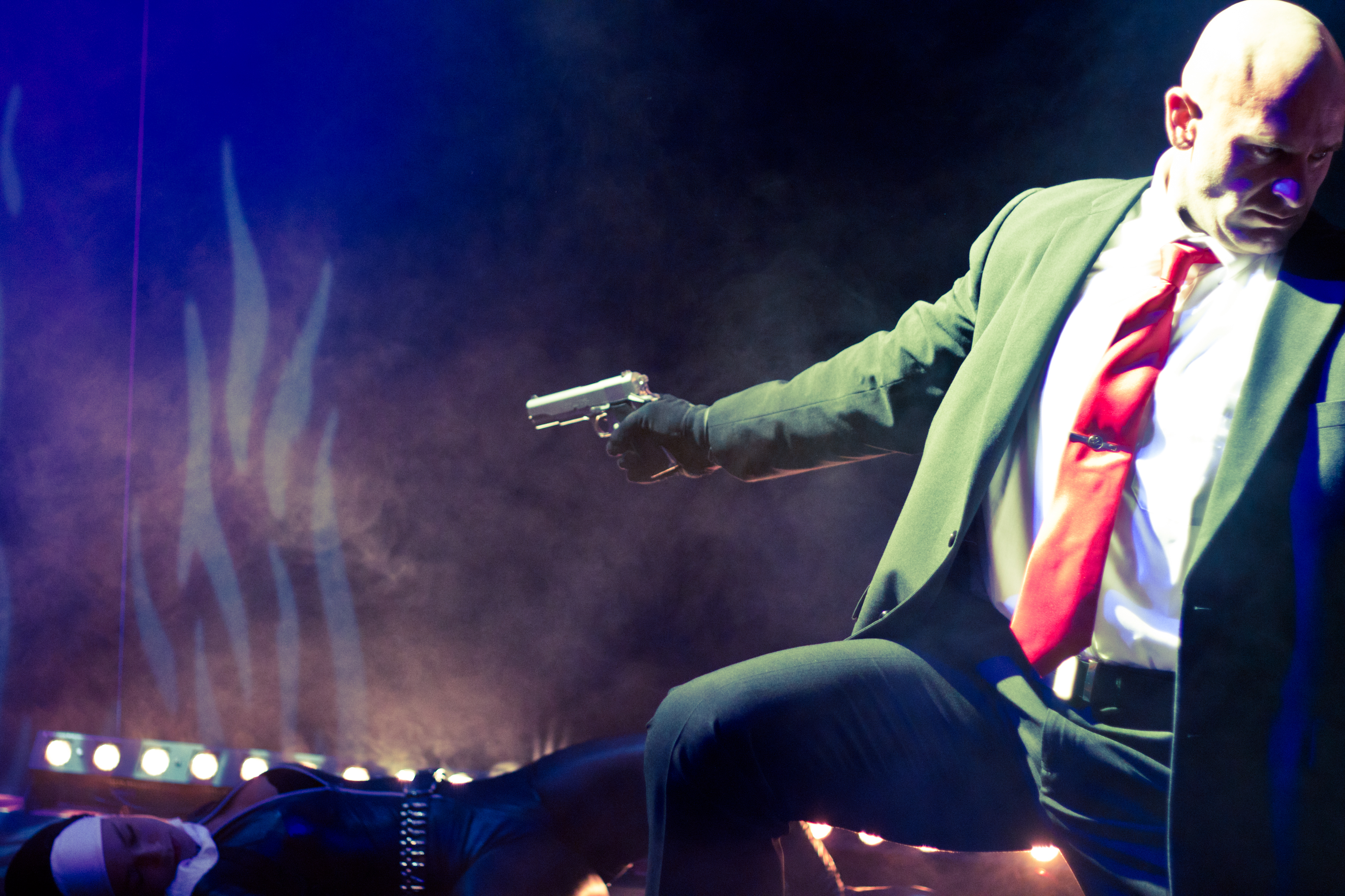 Paris Games Week 2012.